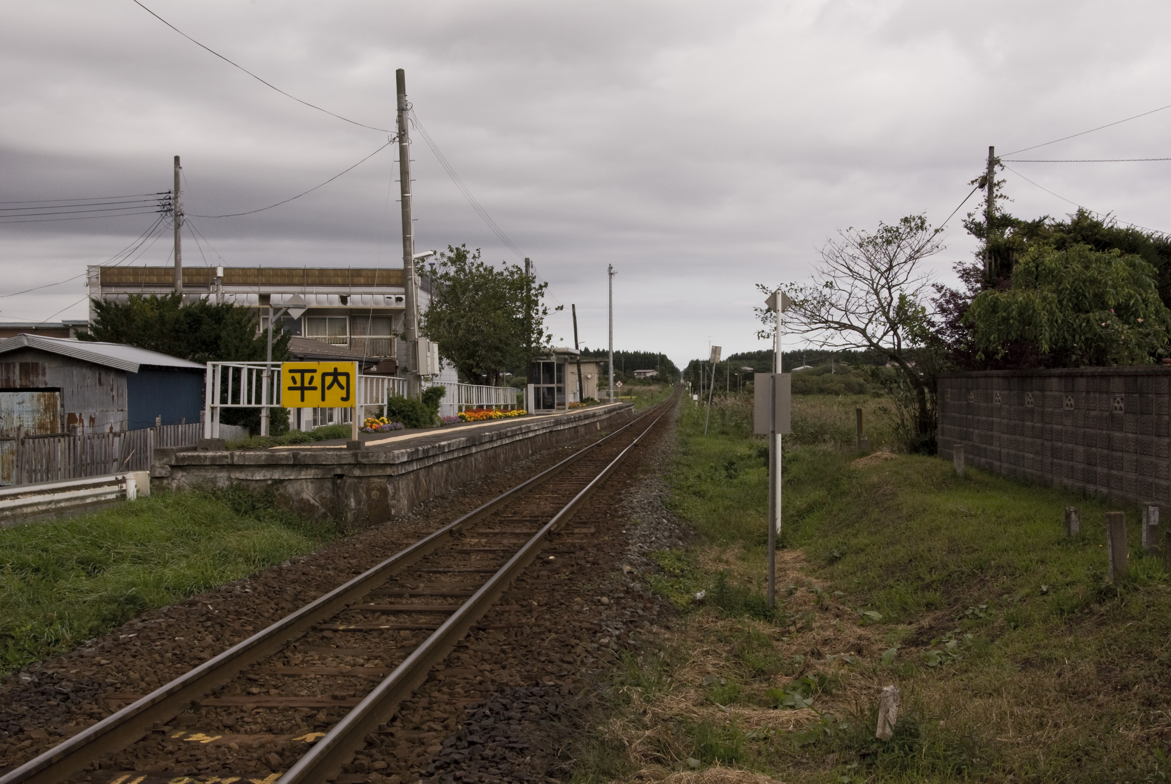 JR八戸線平内駅